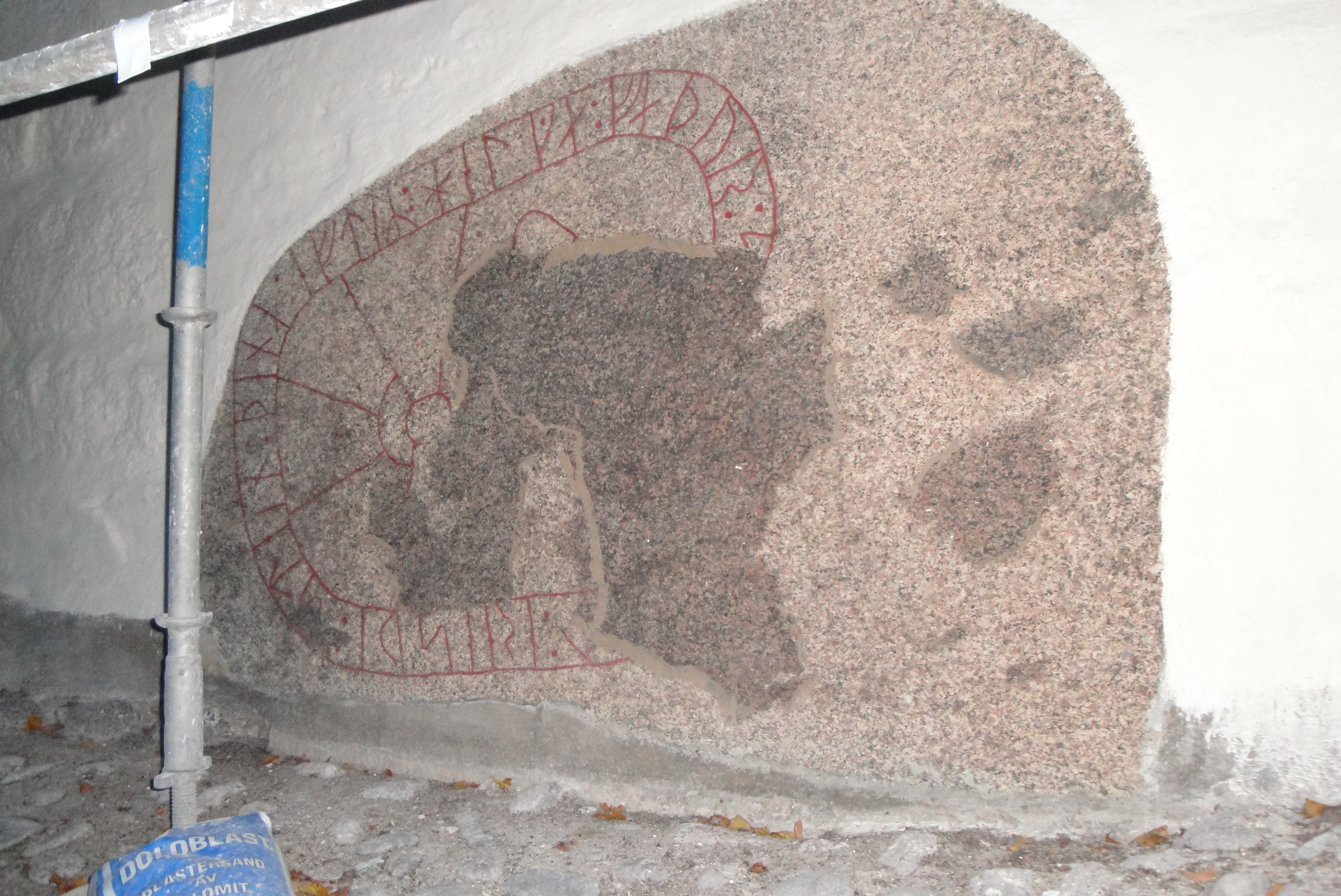 Runstenen Ög 144 (Ödeshög 16:1).